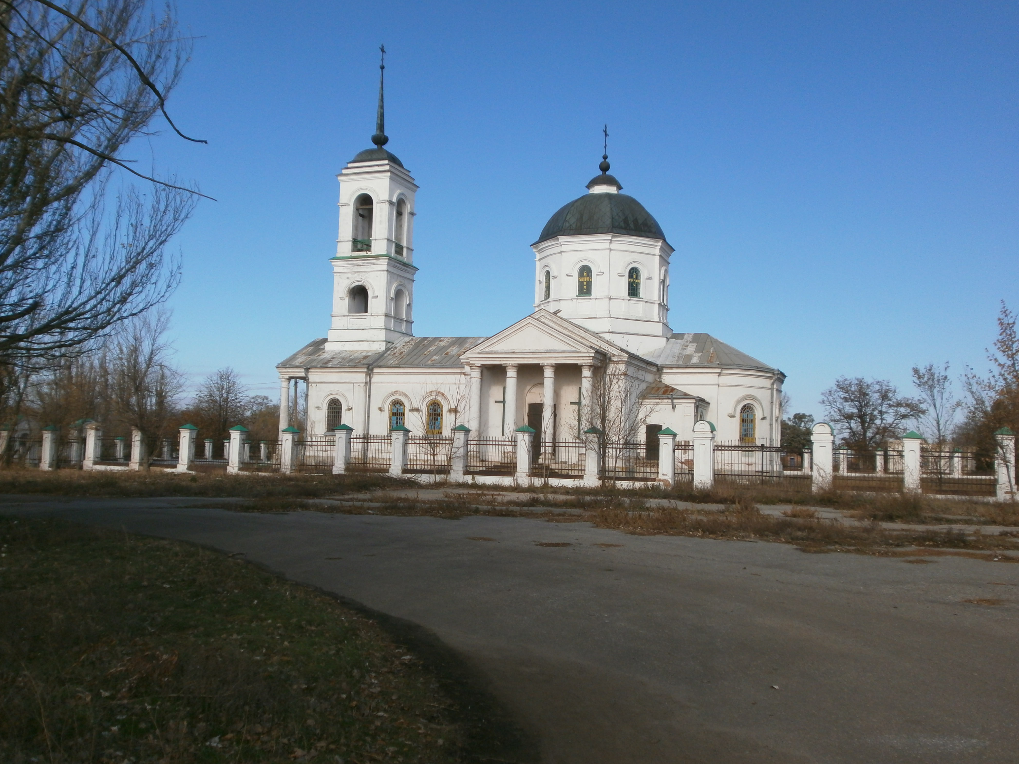 Вознесенська церква, С. Новопрокопівка